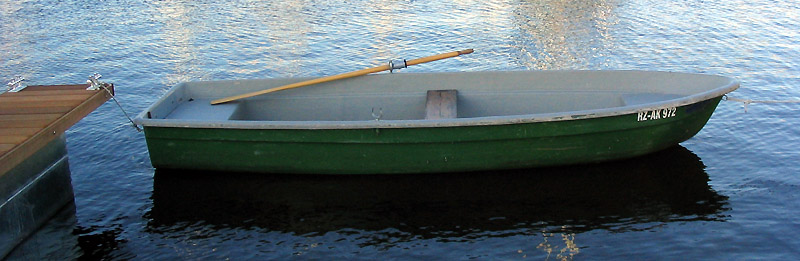 Ruderboot im Stralsunder Stadthafen